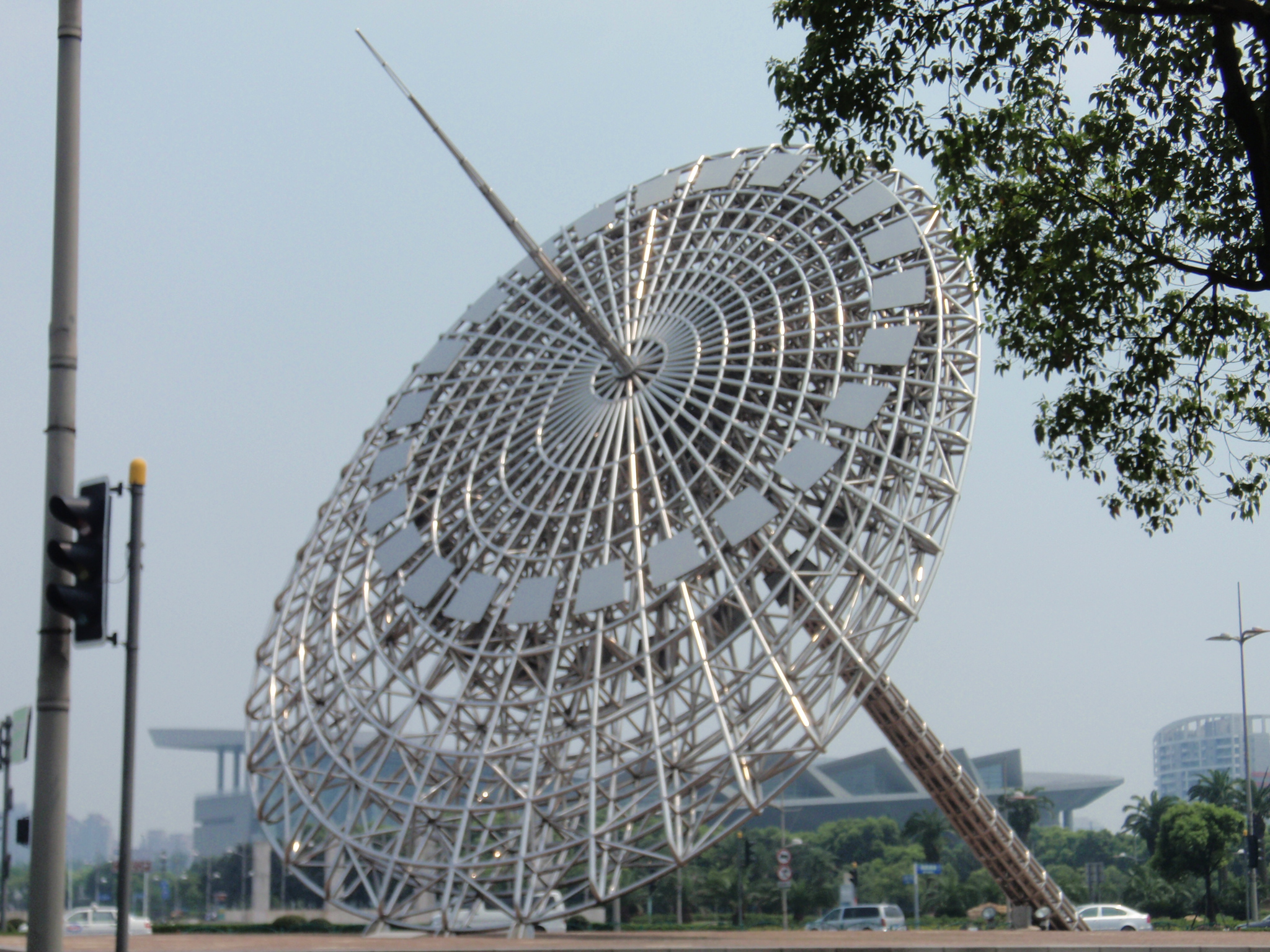 位于中国上海世纪大道的东方之光。